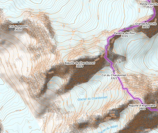 carte réalisée sur umap This map may be incomplete, and may contain errors. Don't rely solely on it for navigation.